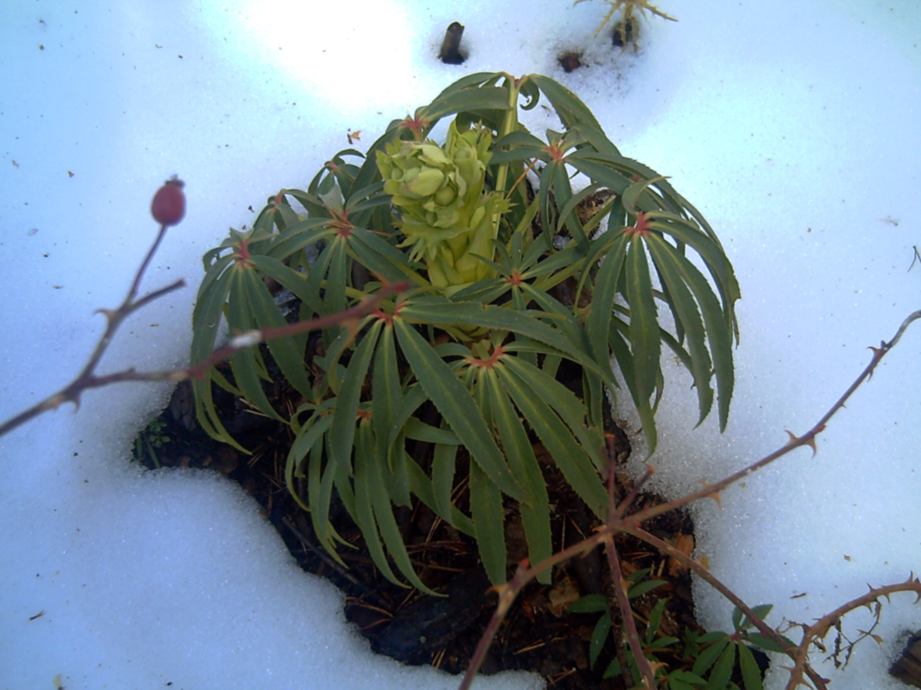 Hoya de Pedraza Botanical Garden in Sierra Nevada (Spain) Helleborus foetidus